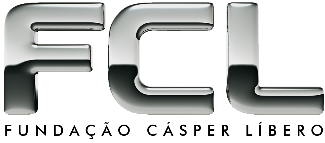 Logo da Fundação Cásper Líbero